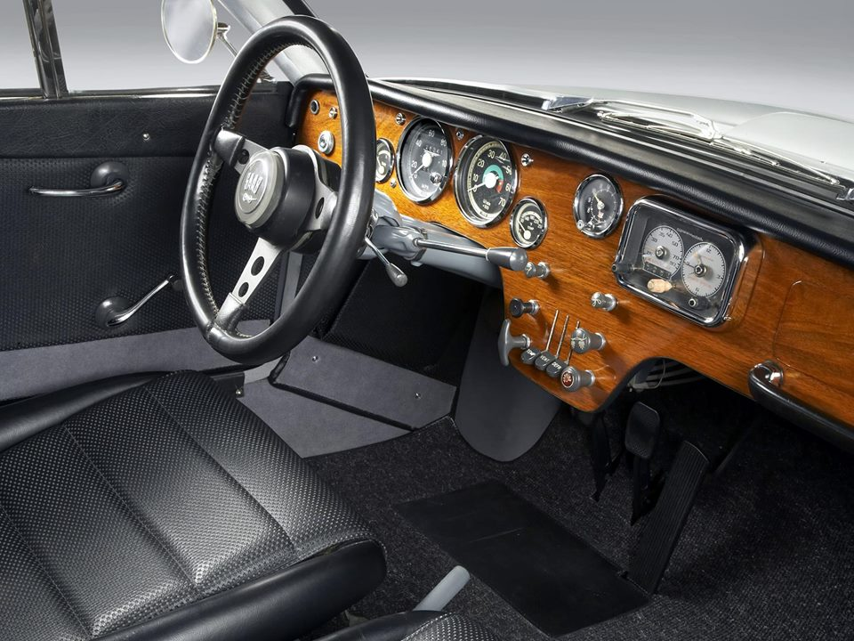 Wnętrze Saab Sonett II